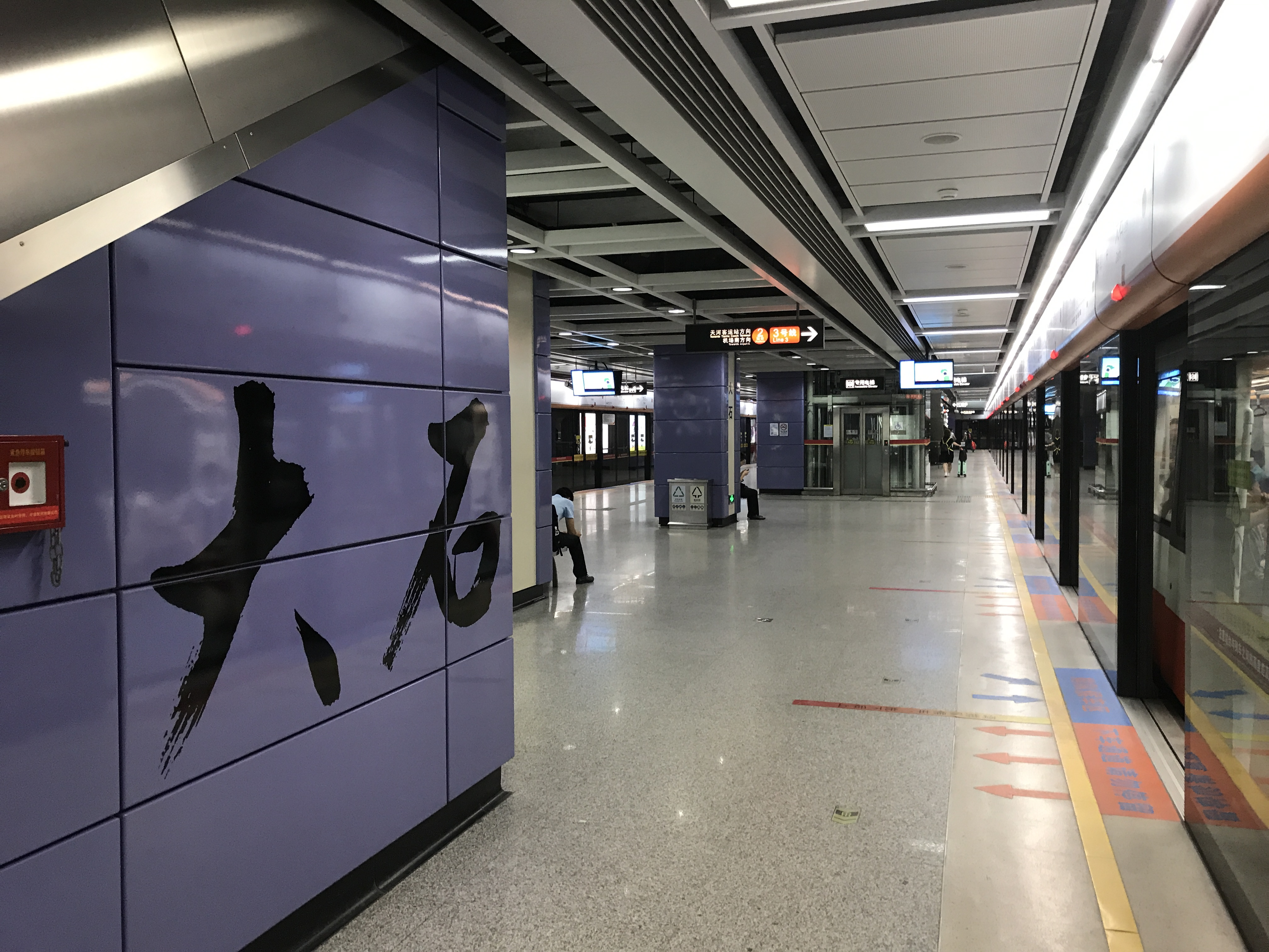 广州地铁大石站